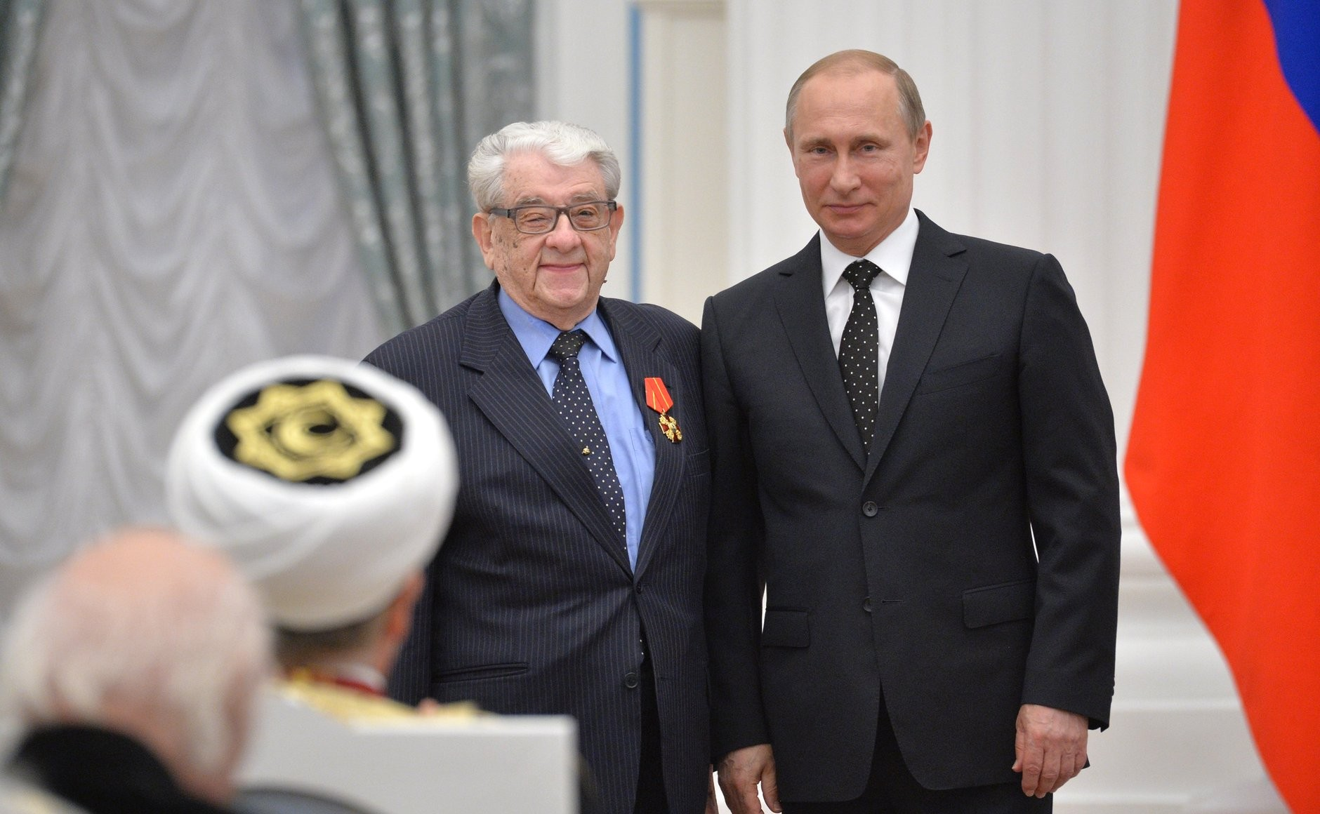 Церемония вручения государственных наград Российской Федерации